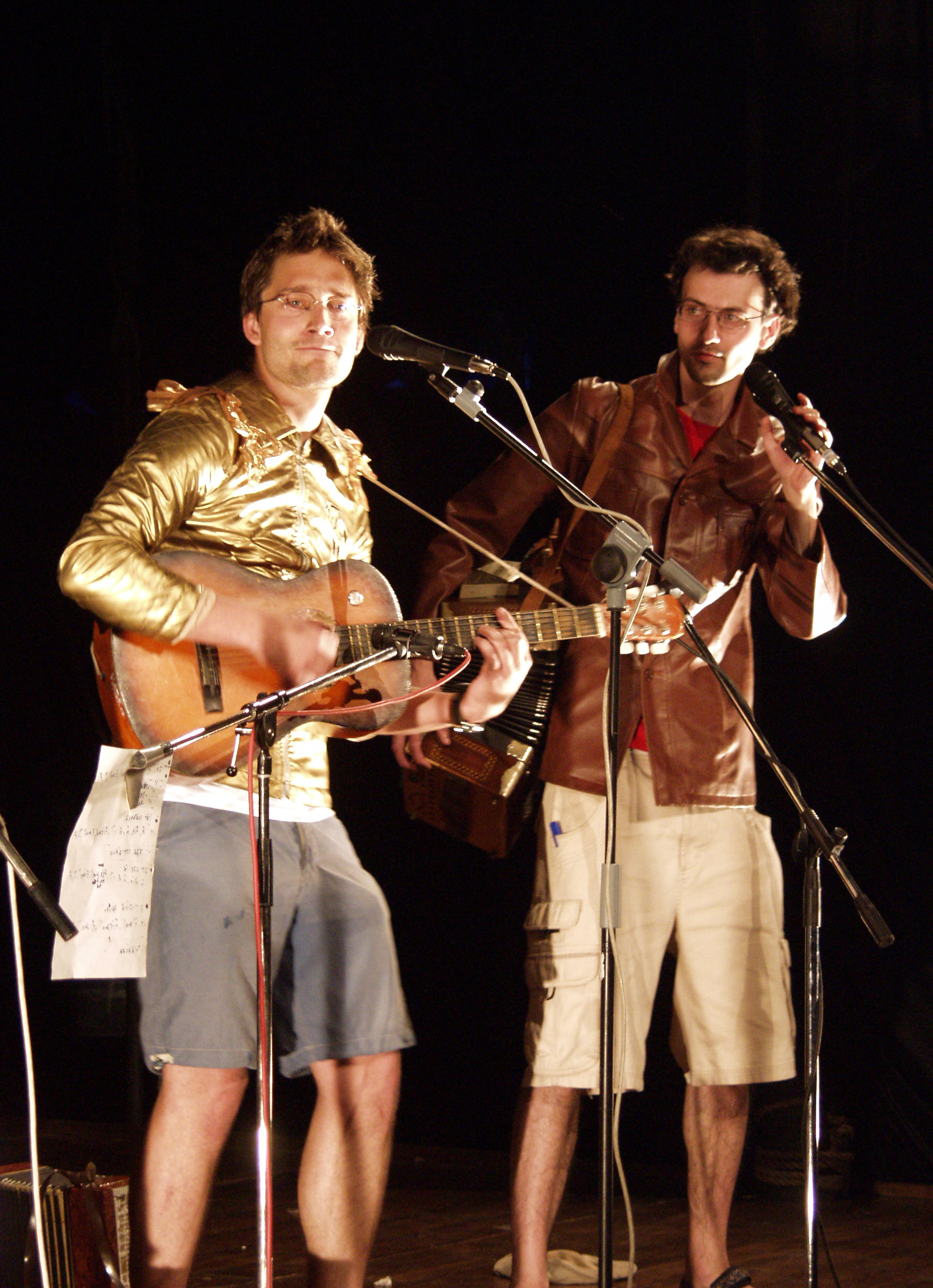 Vosto5: Koncert kapel Tesla a Tatra, festival Ostrovy/Islands 2006, Pardubice